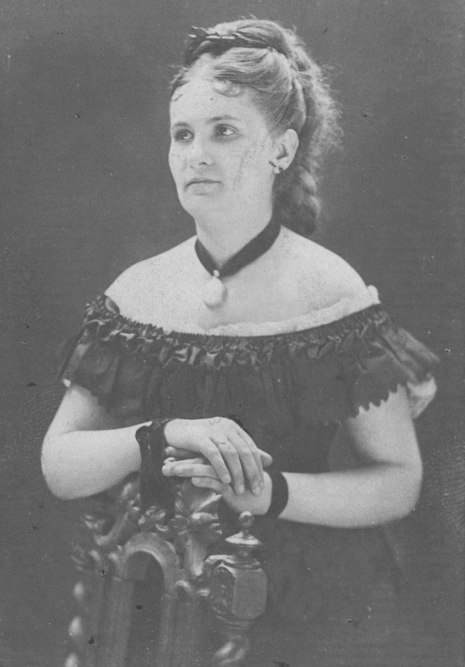 La artista guayaquileña Dolores Sucre Lavayén, sobrina del mariscal Antonio José de Sucre. Fotografía de 1870.